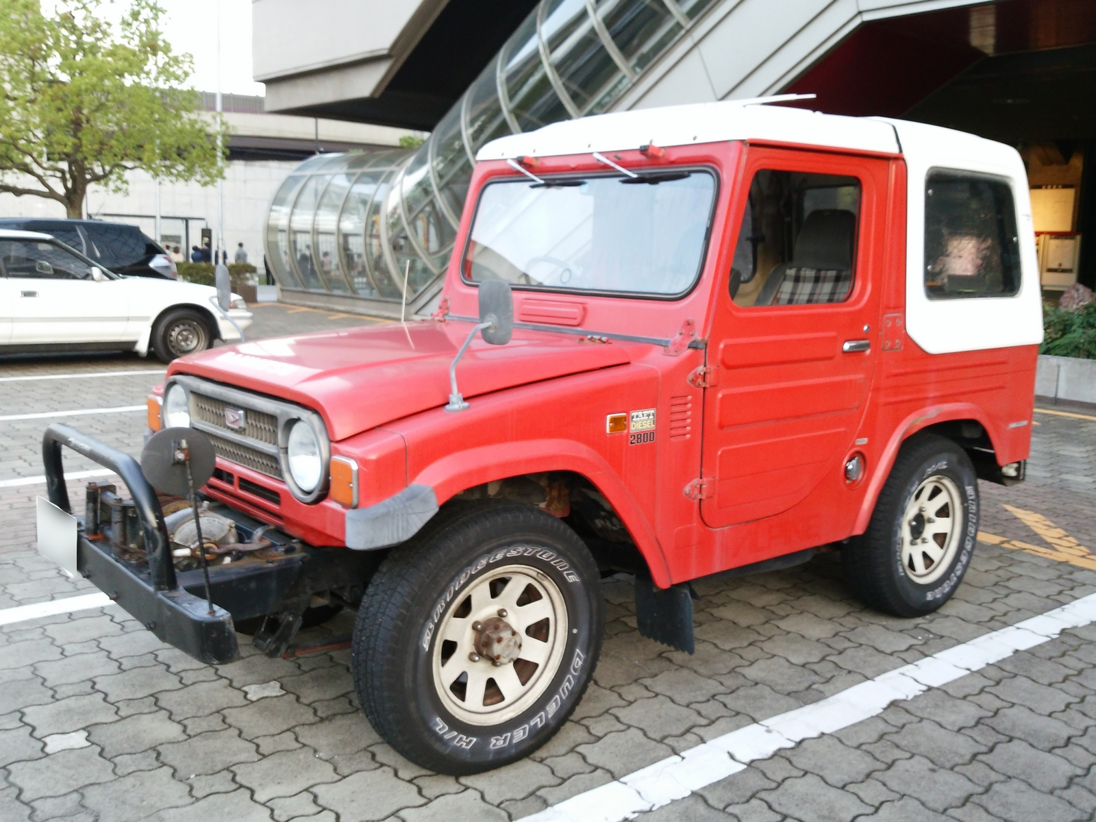 ダイハツ タフト（最終型）